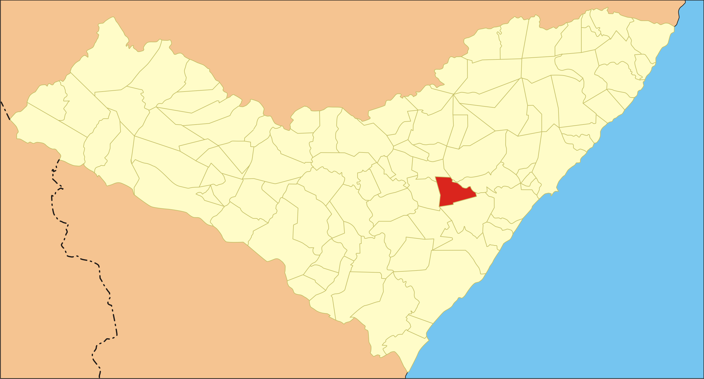 Localização da cidade no estado de Alagoas.